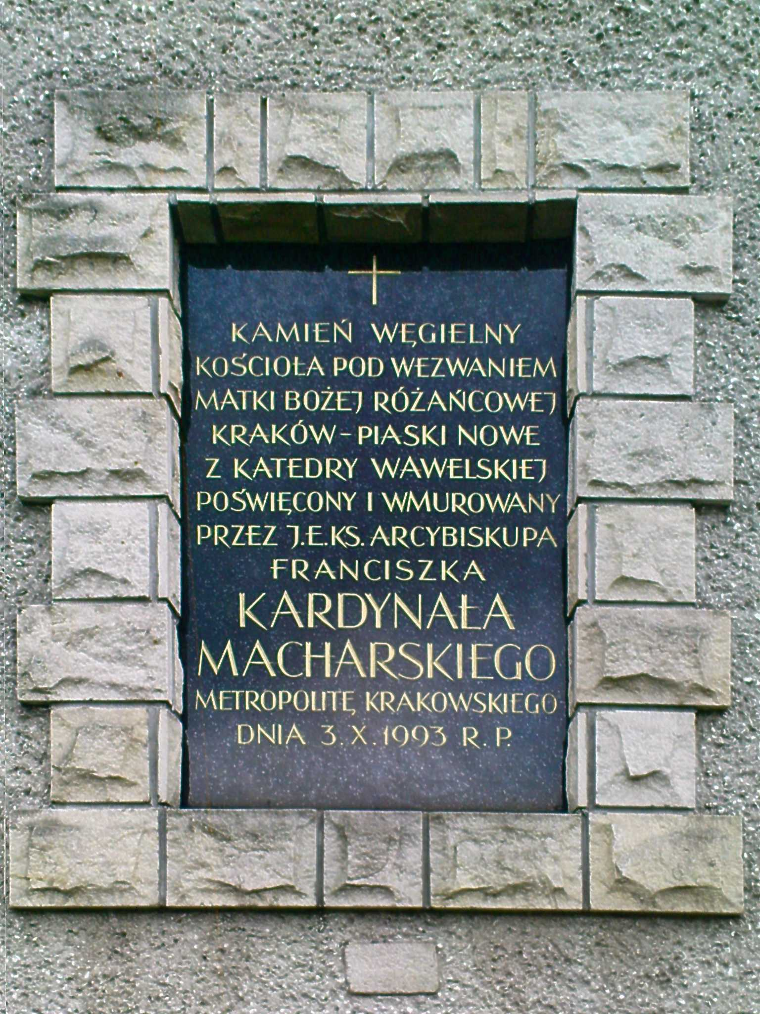 Kamień węgielny kościoła pod wezwaniem Matki Bożej Różańcowej, Kraków-Piaski Nowe